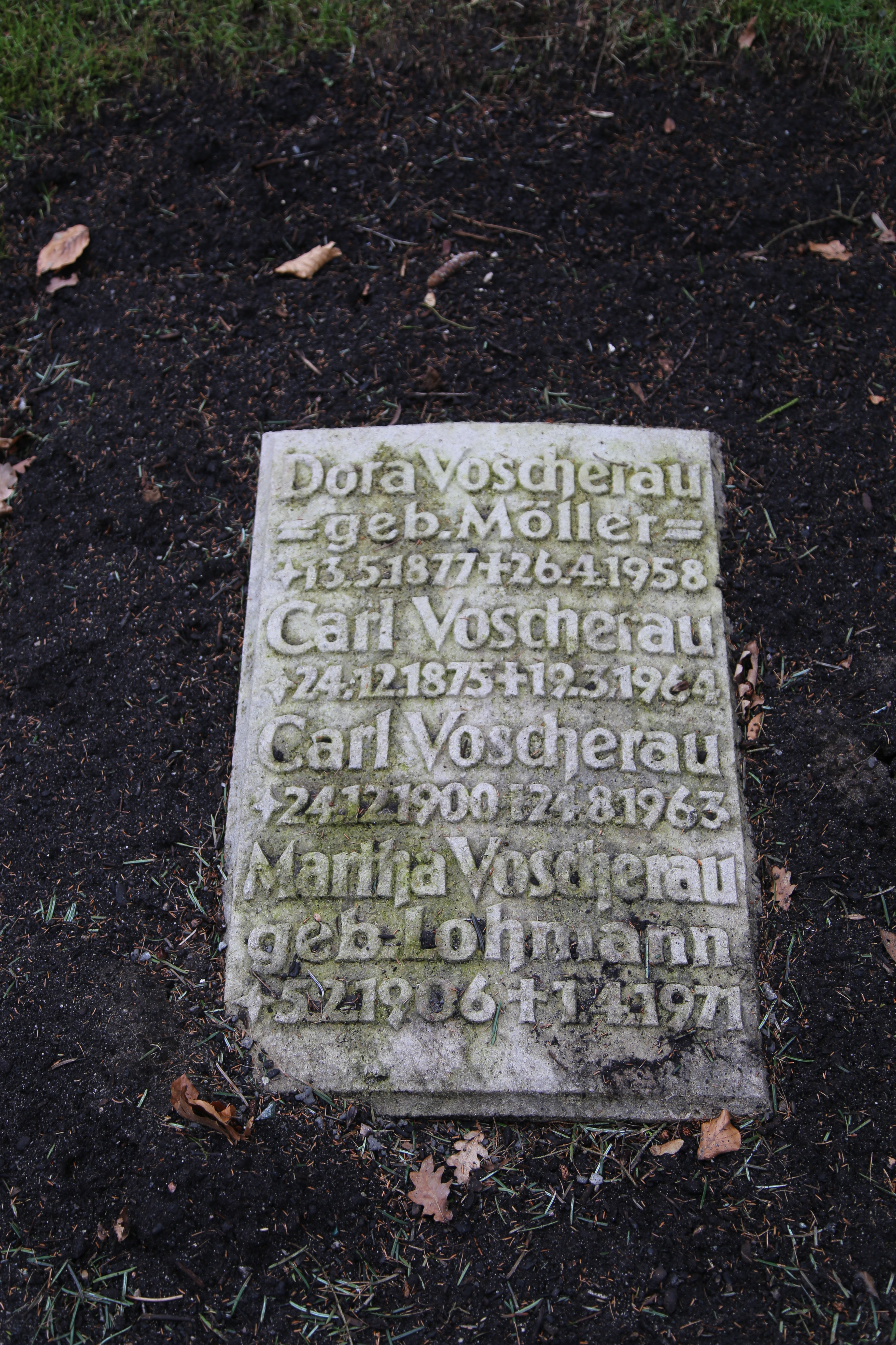 Carl Hans August Voscherau (* 24. Dezember 1900 in Hamburg; † 24. August 1963 ebenda) war ein deutscher Schauspieler, Hörspiel- und Synchronsprecher. Nach einer kaufmännischen Lehre wurde er Finanzbeamter.